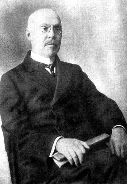 Zlinszky Aladár magyar nyelvész, irodalomtörténész, esztéta, a Magyar Tudományos Akadémia tagja.